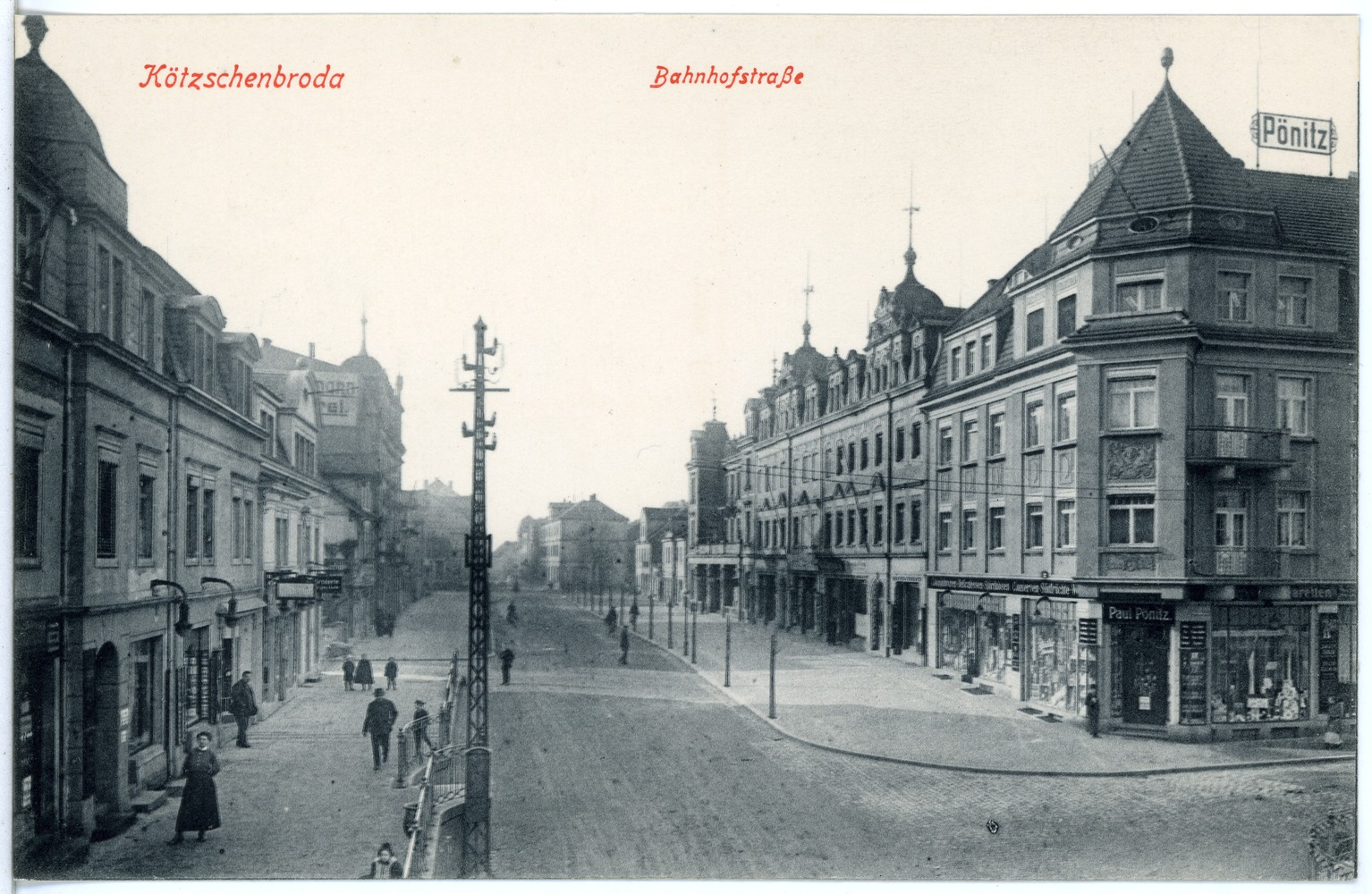 Radebeul; Bahnhofstraße - Kötzschenbroda This postcard is from publisher Brück & Sohn in Meißen ( postcard has a unique number 18668 and is available in a higher resolution at the publisher. This images was uploaded in a cooperation project between Wikipedians and the publisher.